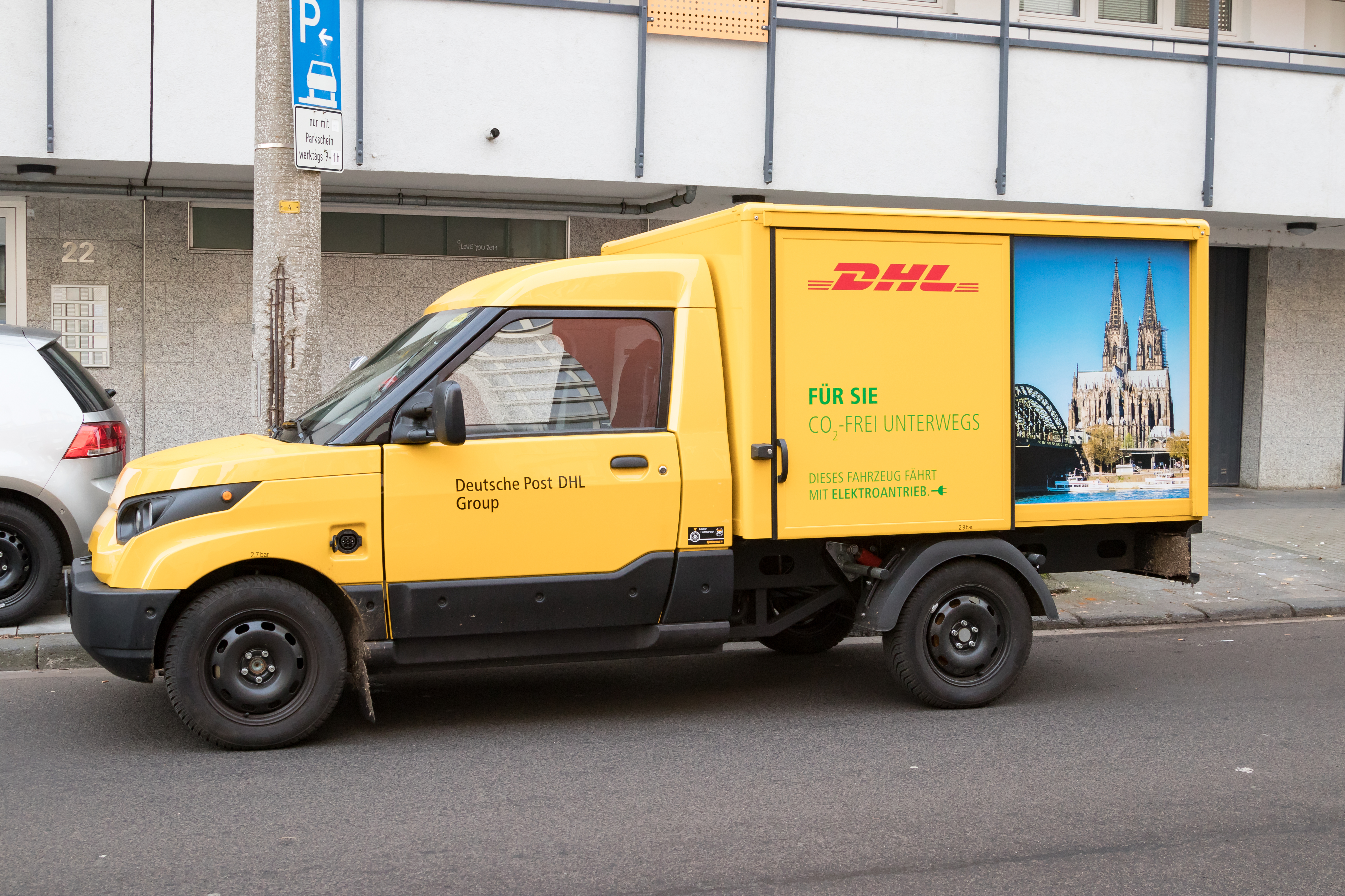 StreetScooter der Deutsche Post DHL Group (Elektrofahrzeug, Modell StreetScooter Work) in Köln